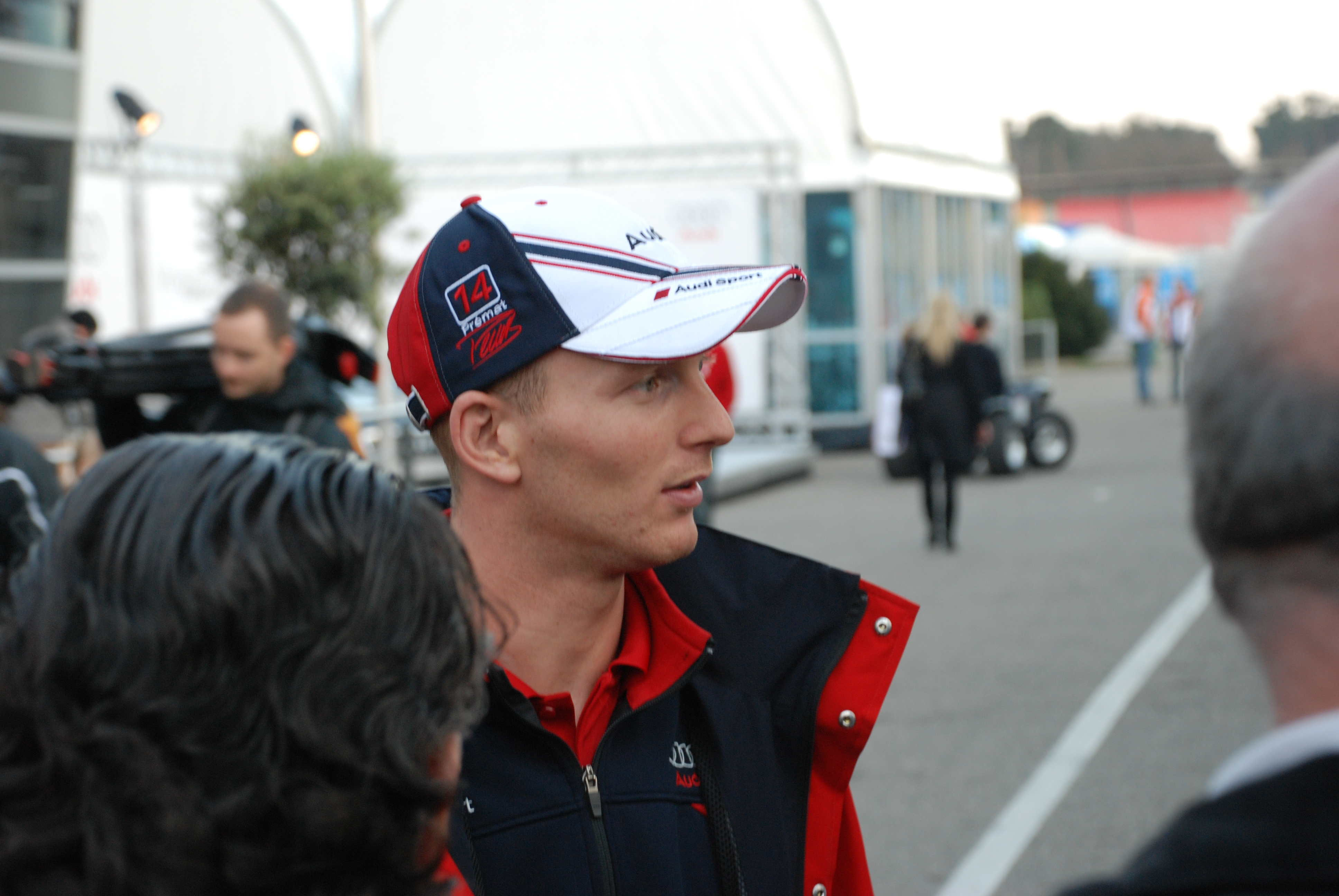 Alexandré Premat, Werkspilot von Audi in der DTM und der Le Mans Serie